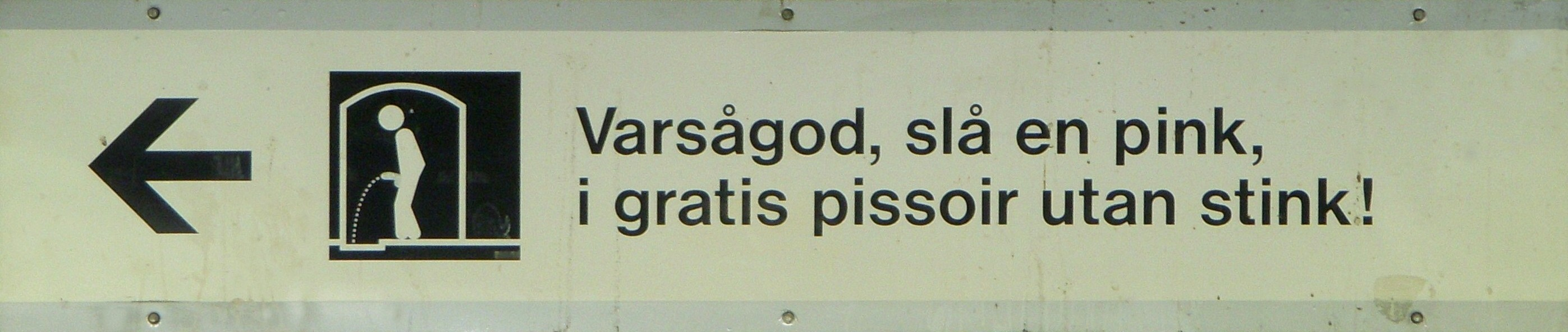 Skylt i Gullmarsplans T-banestation